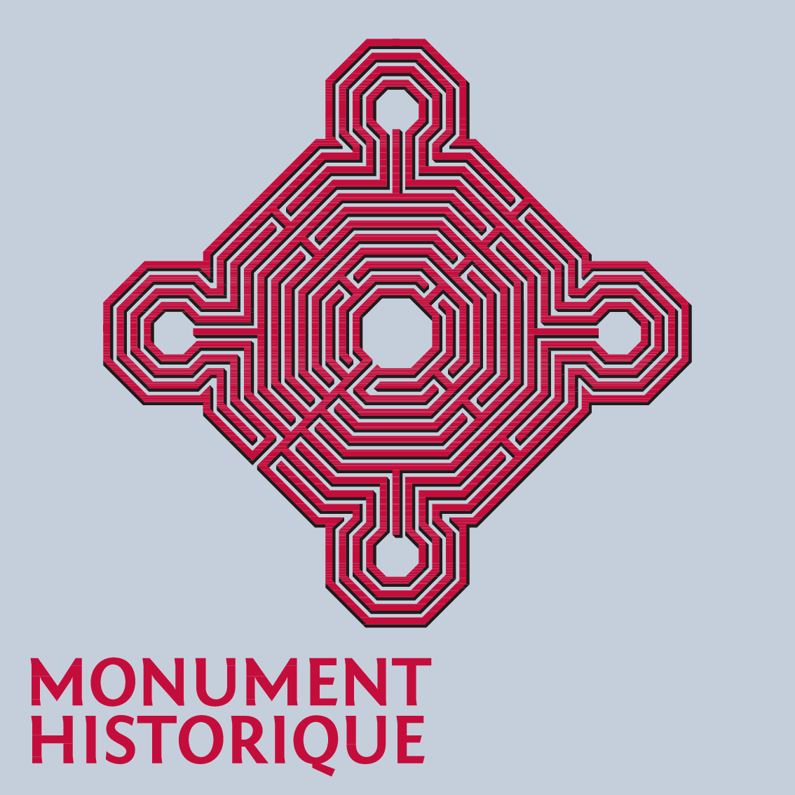 Logotype identifiant un monument classé ou inscrit au titre des monuments historiques.